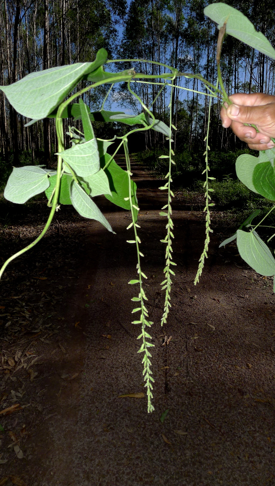 Dioscorea stegelmanniana R.Knuth